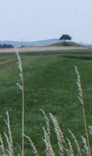 Hügelgrab Galgenberg bei Klein Vahlberg